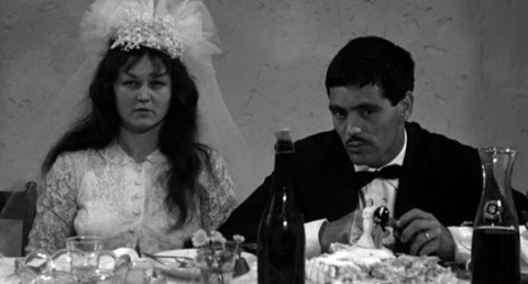 Screenshot from Mamma Roma directed by Pier Paolo Pasolini